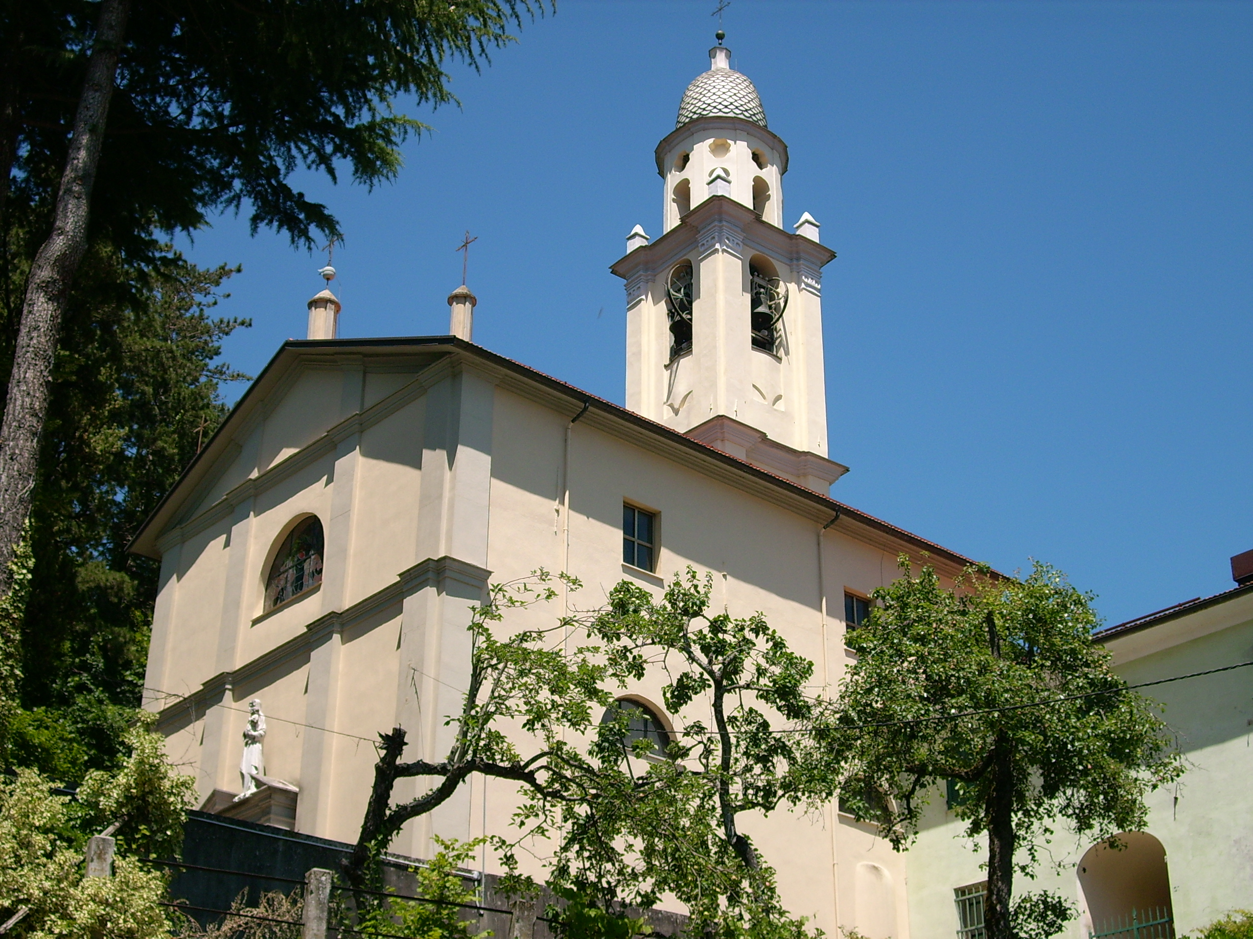 Chiesa di santa Caterina a Gorreto, Liguria, Italia